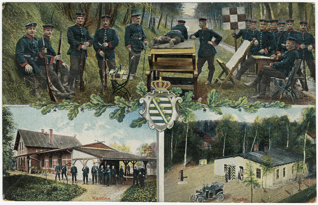 "Gruß vom Militair-Schiesstand, Bienitz bei Leipzig" (Postkarte, vor 1914, Photograph und Verlag P. Berg), Stadtgeschichtliches Museum Leipzig, Inv.-Nr. PK 5309